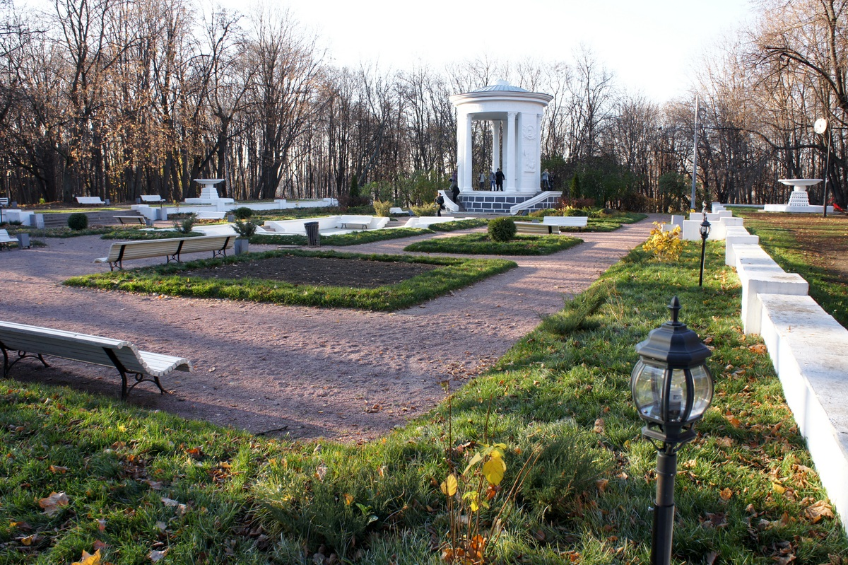 Архитектурный ансамбль в честь 800-летия Москвы в Нескучном саду.